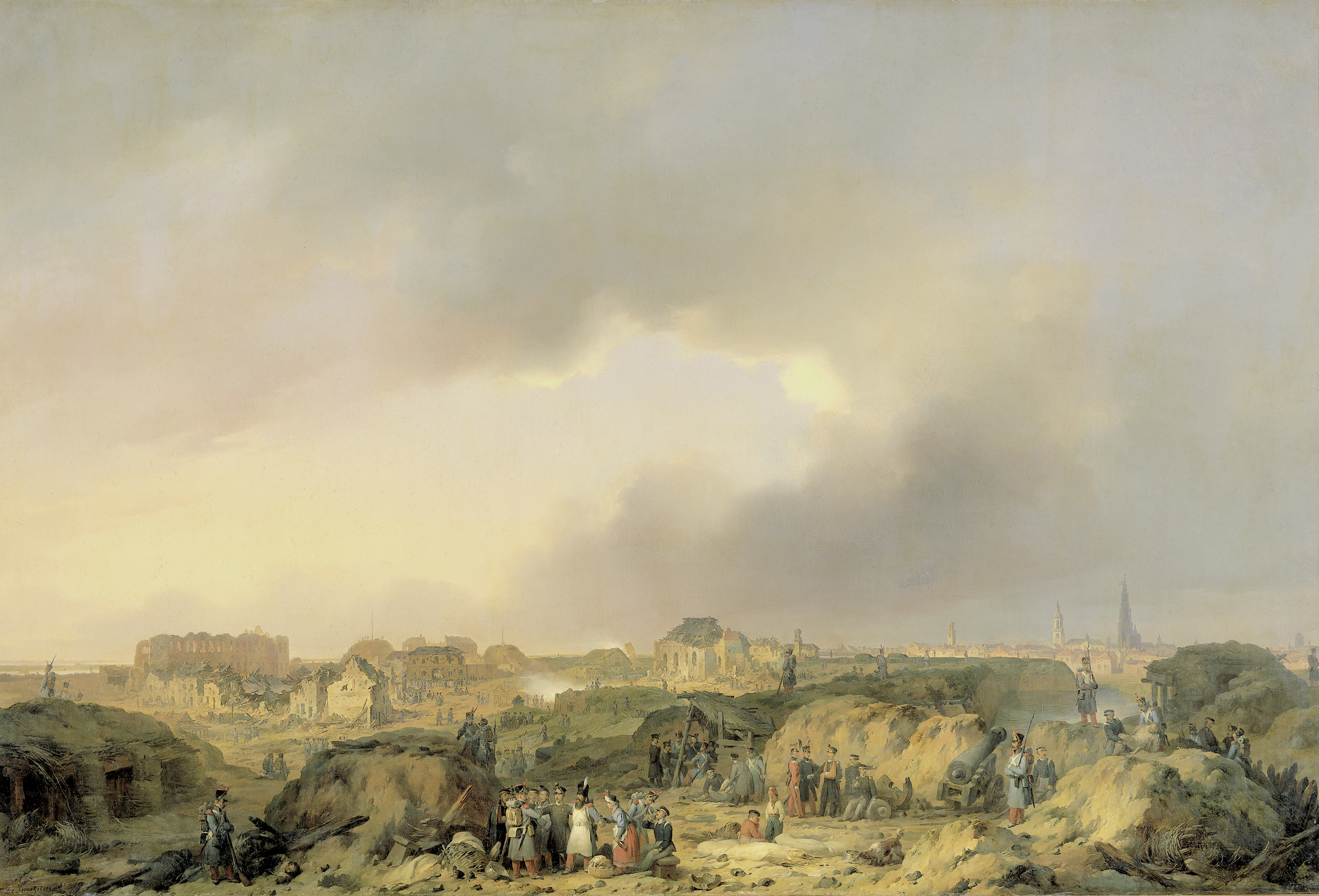 De citadel van Antwerpen kort na het beleg van 19 november tot 23 december 1832 en de overgave van de Nederlandse bezetting aan de Fransen. Op de voorgrond lopen soldaten tussen puinhopen van de vesting. In de verte het profiel van de stad.